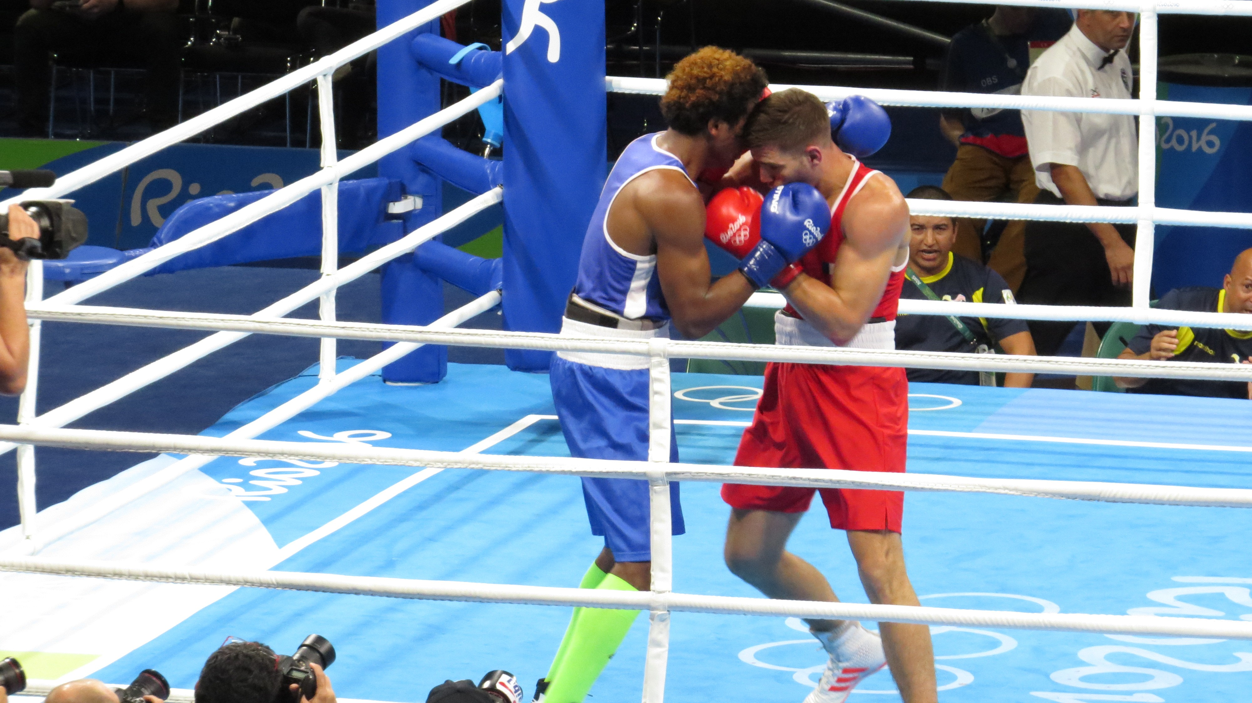 Sx50